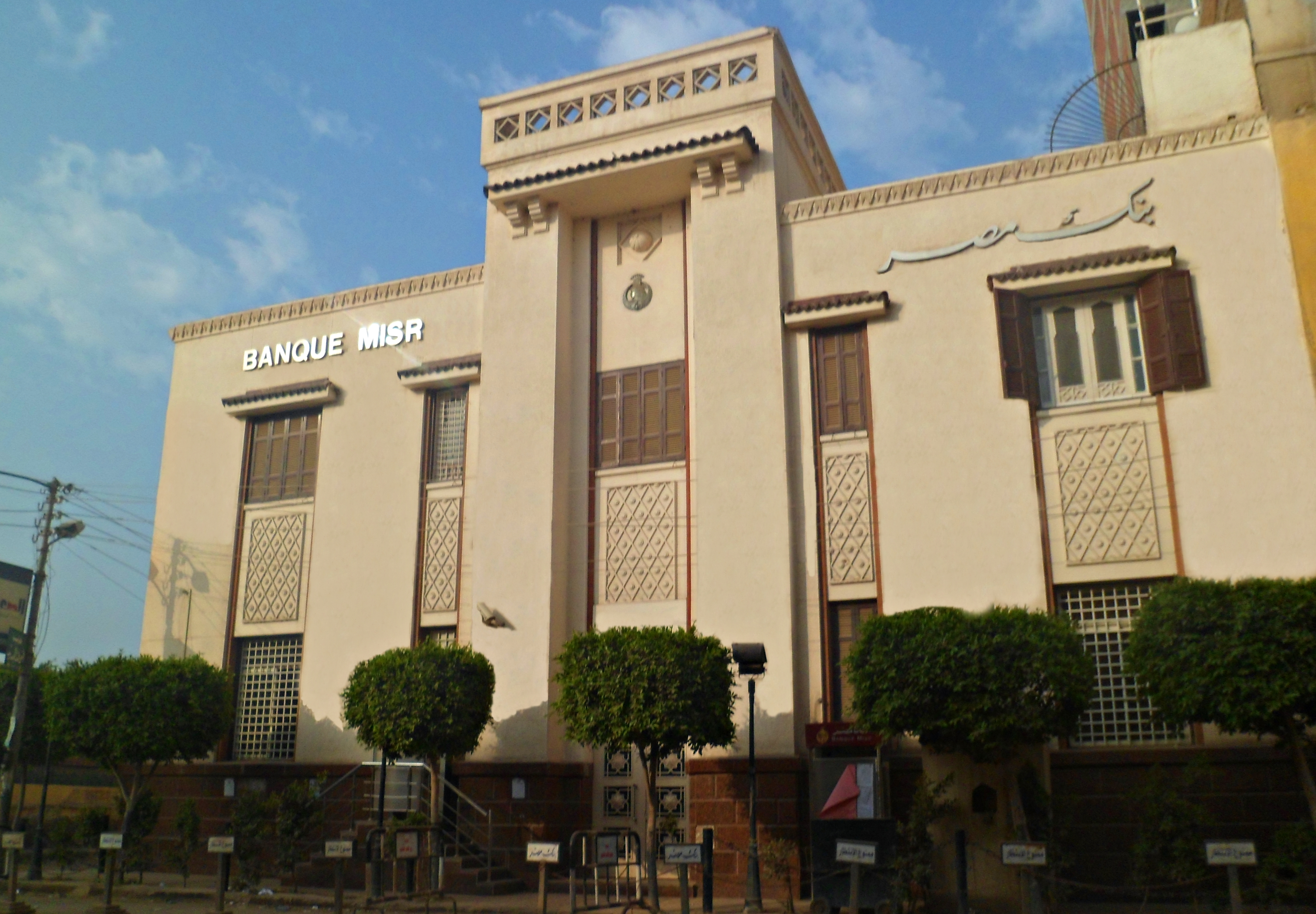 بنك مصر، فرع دسوق